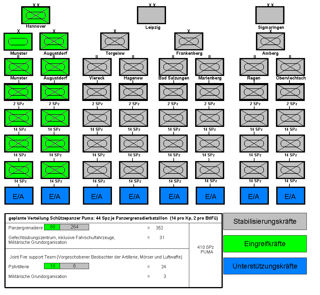 Struktur „Neues Heer“ für die Panzergrenadiere der Bundeswehr, inklusive Verteilung des neuen Schützenpanzer Puma